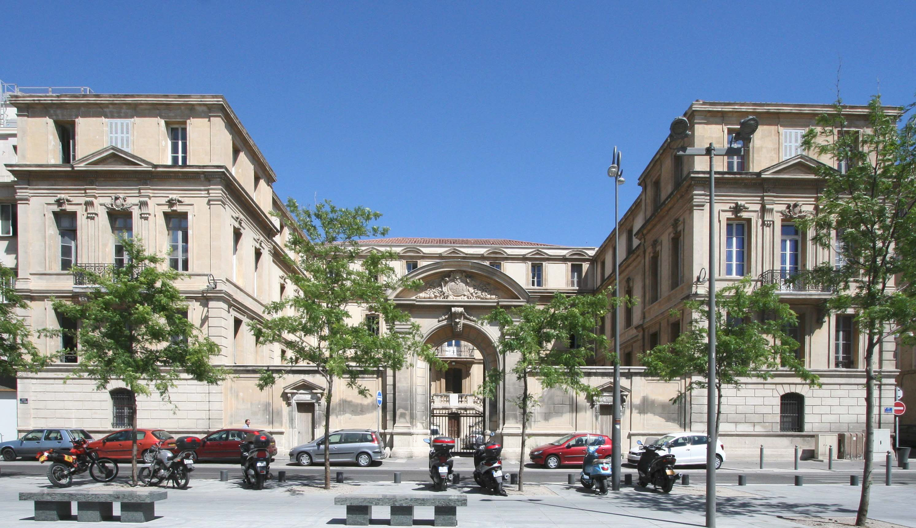 Hôtel de police à Marseille, dit "évêché", car ancien palais épiscopal de Marseille, inscrit monument historique.